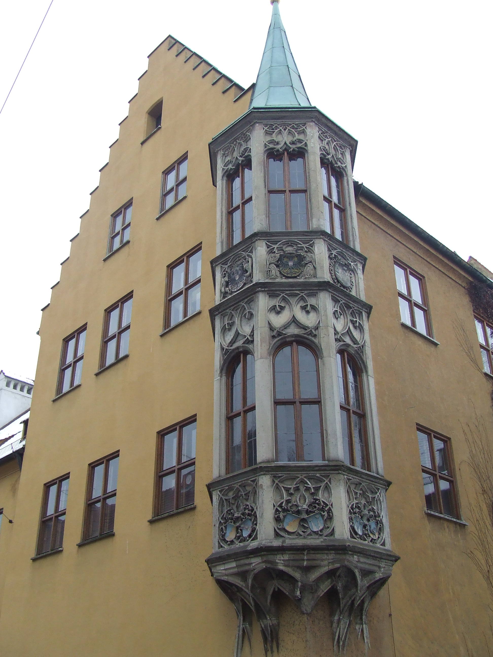 Augsburg, Jakoberstraße 22 und 22 a, Verwaltungsgebäude der Fuggerei, Erker